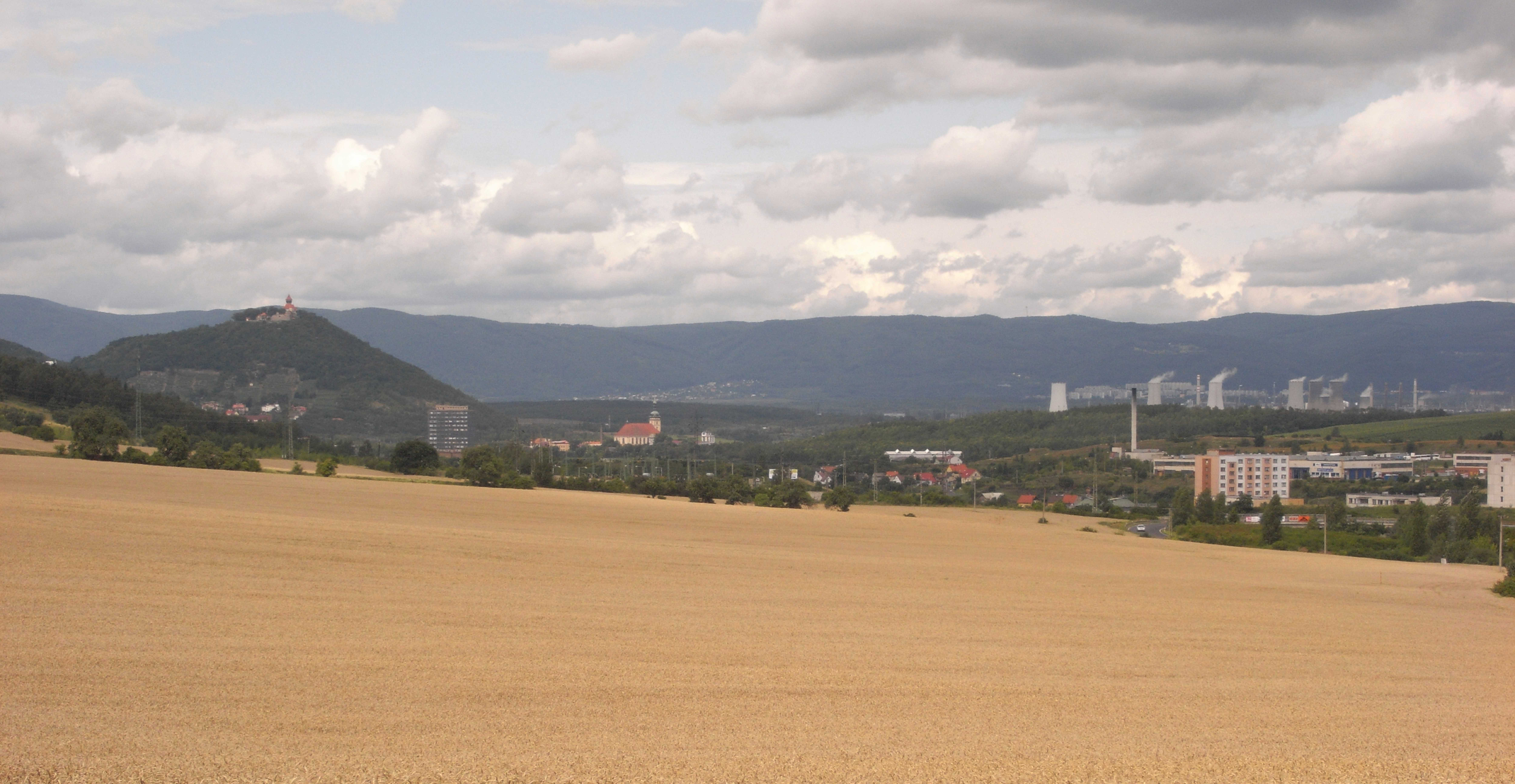 Blick vom Süden auf die Stadt Most (Nordböhmen, Tschechische Republik)